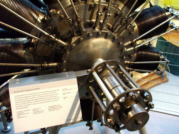 Siemens-Halske Sh.III at Technisches Museum Wien